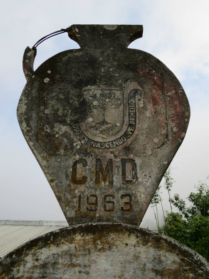 Remexio Vila